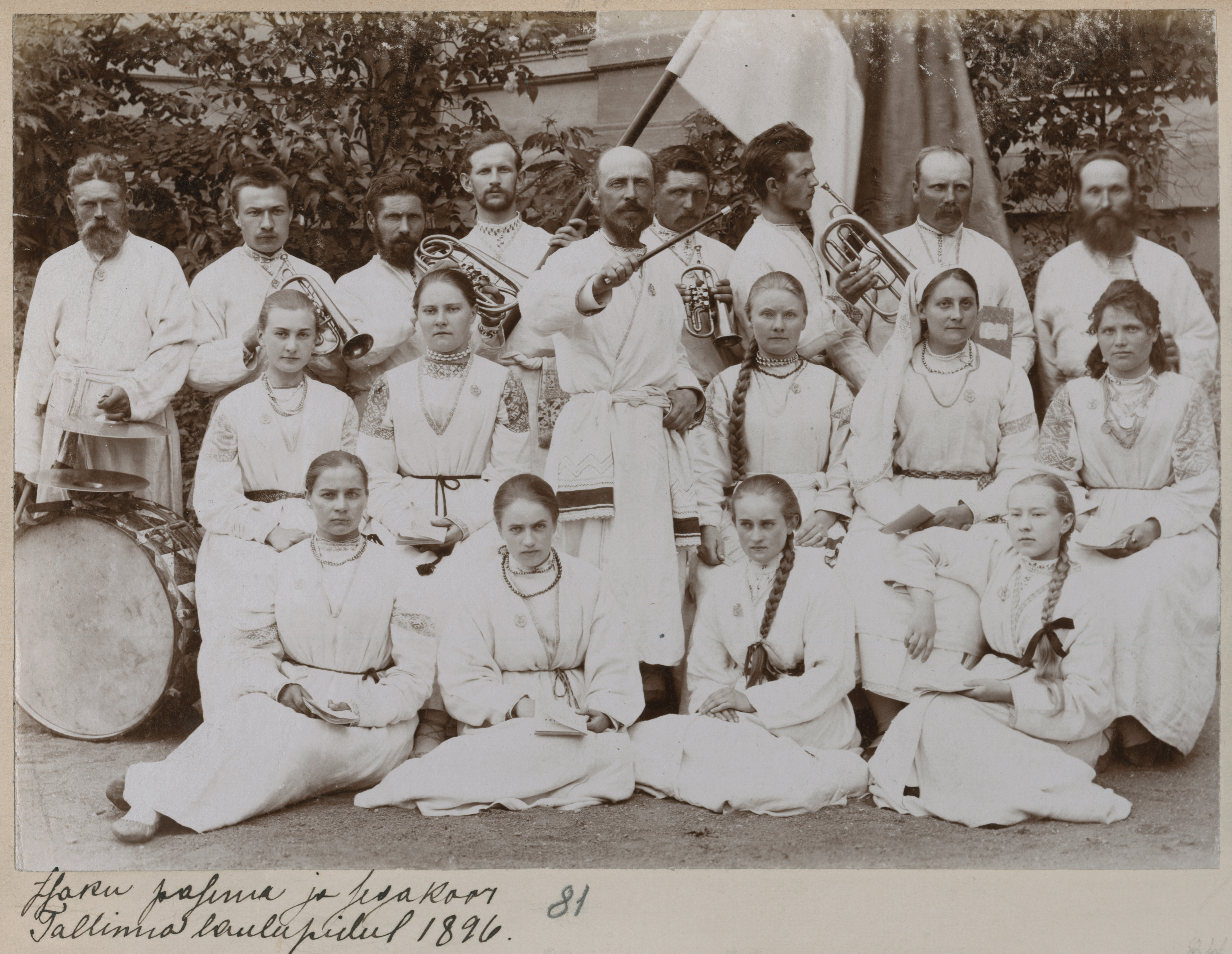 Iisaku pasuna- ja segakoor Tallinnas laulupeol.